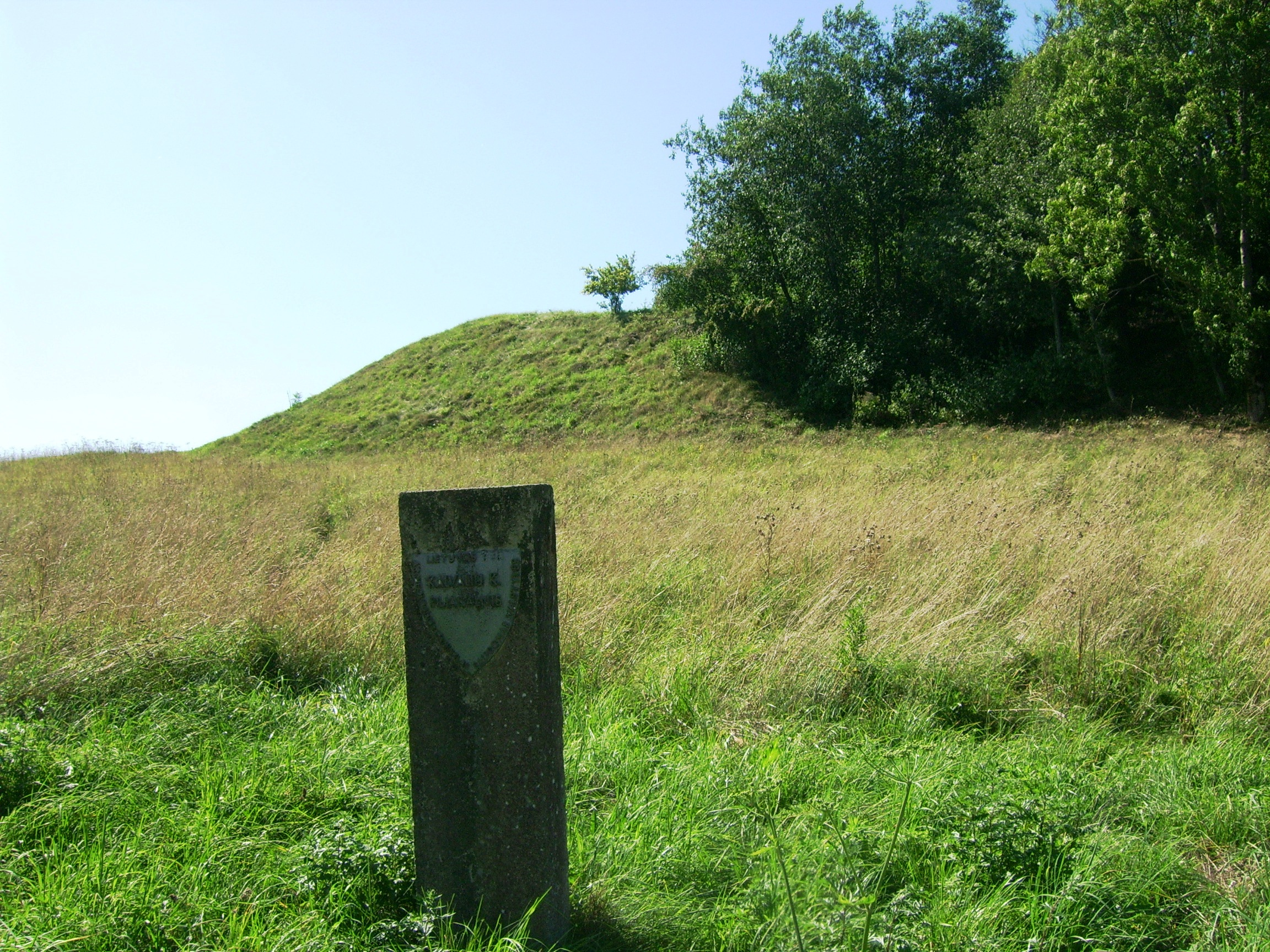 Kalvaliai – kaimas Šilalės rajone, Upynos seniūnijoje